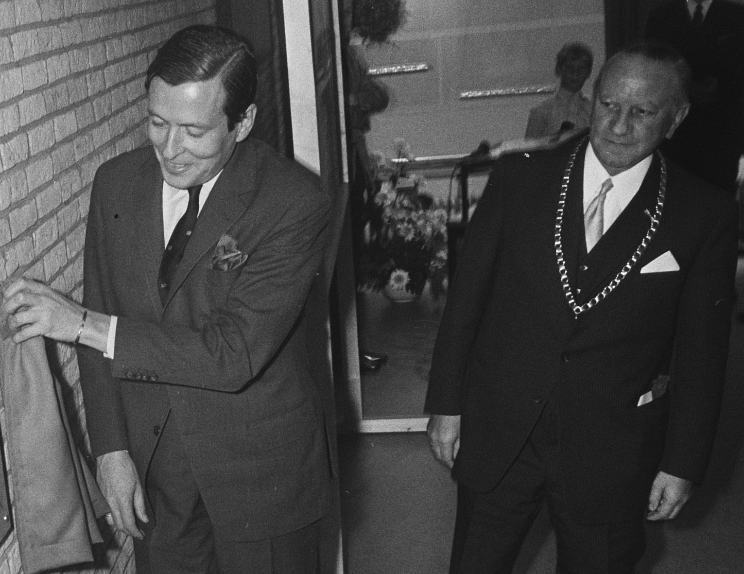 Collectie / Archief : Fotocollectie Anefo Reportage / Serie : [ onbekend ] Beschrijving : Prins Claus opent "Prins Clausschool" in Linschoten; Prins Claus onthult plaat Datum : 30 november 1970 Trefwoorden : onthullingen, openingen Persoonsnaam : Claus, prins Fotograaf : Mieremet, Rob / Anefo Auteursrechthebbende : Nationaal Archief Materiaalsoort : Negatief (zwart/wit) Nummer archiefinventaris : bekijk toegang 2.24.01.05 Bestanddeelnummer : 924-0584